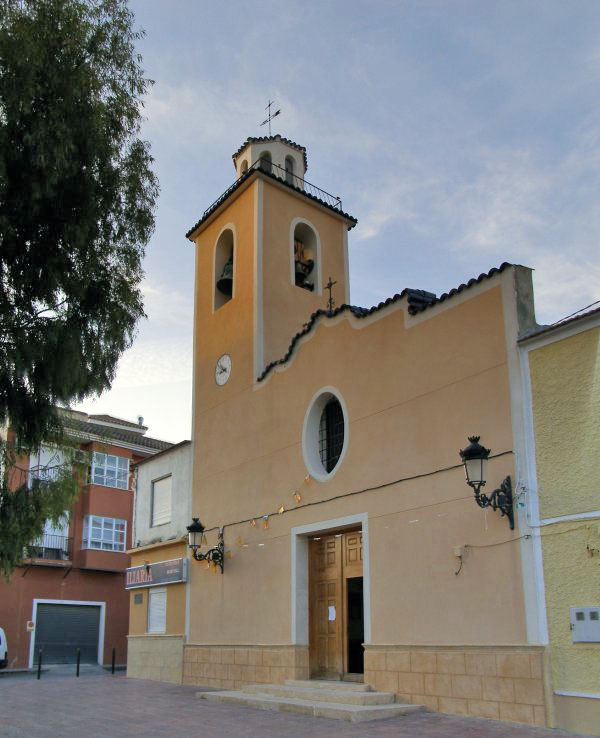 Iglesia parroquial